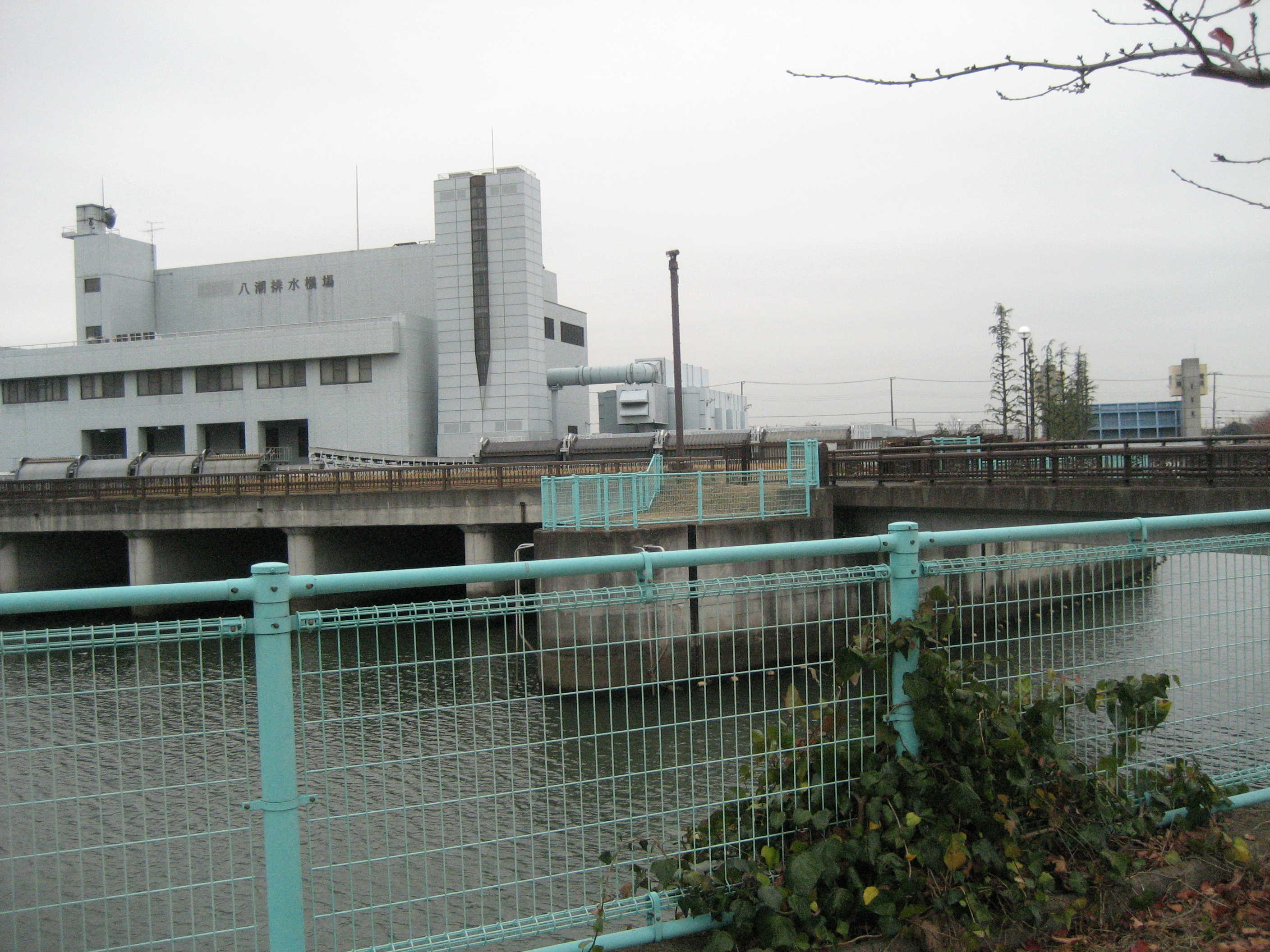 綾瀬川放水路八潮排水機場付近